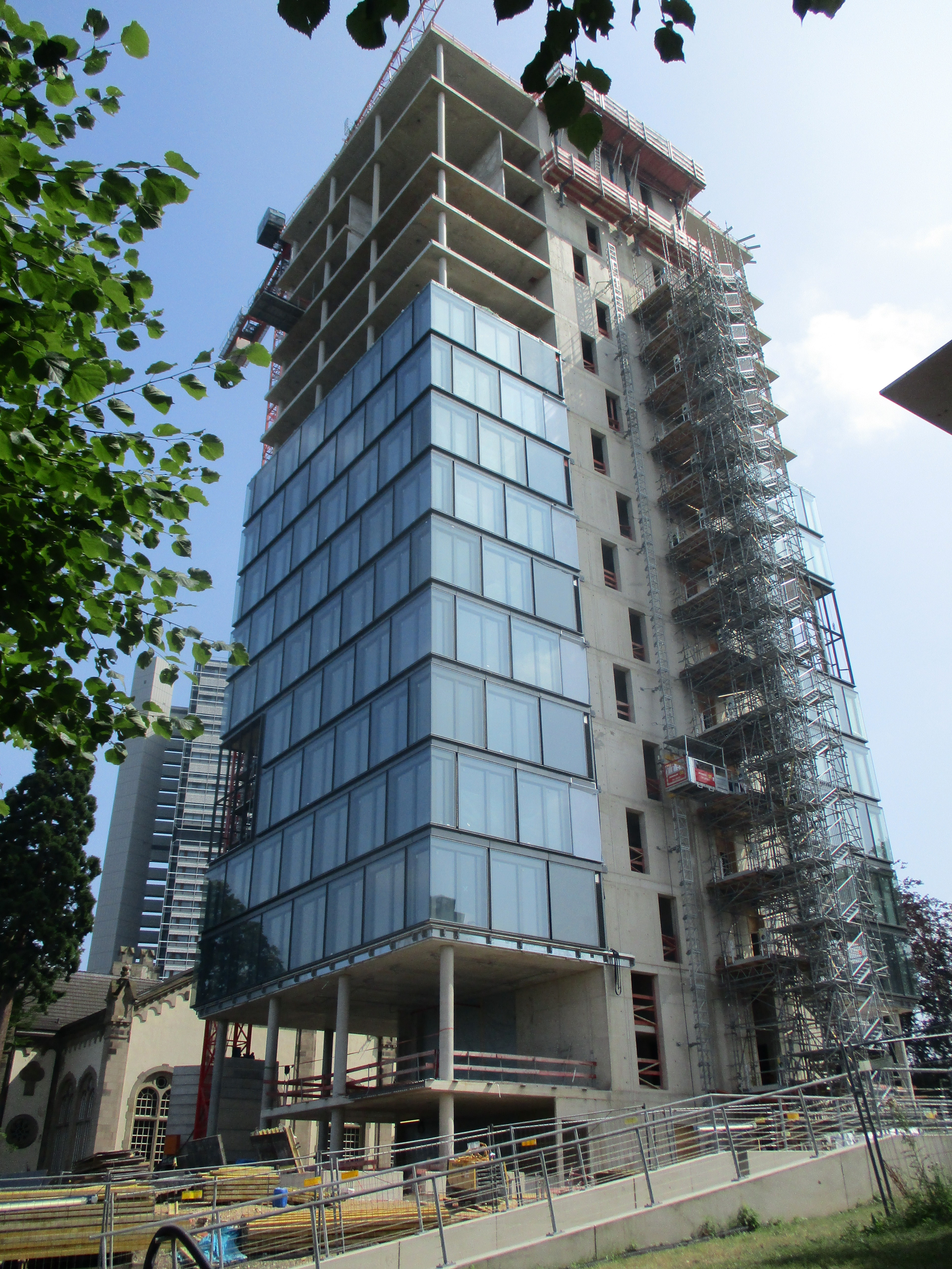 Erweiterungsneubau auf dem UN-Campus, Platz der Vereinten Nationen 1, Bonn-Gronau: Ansicht der Baustelle vom Stresemannufer